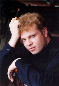 Игорь Валерьевич Бабайлов